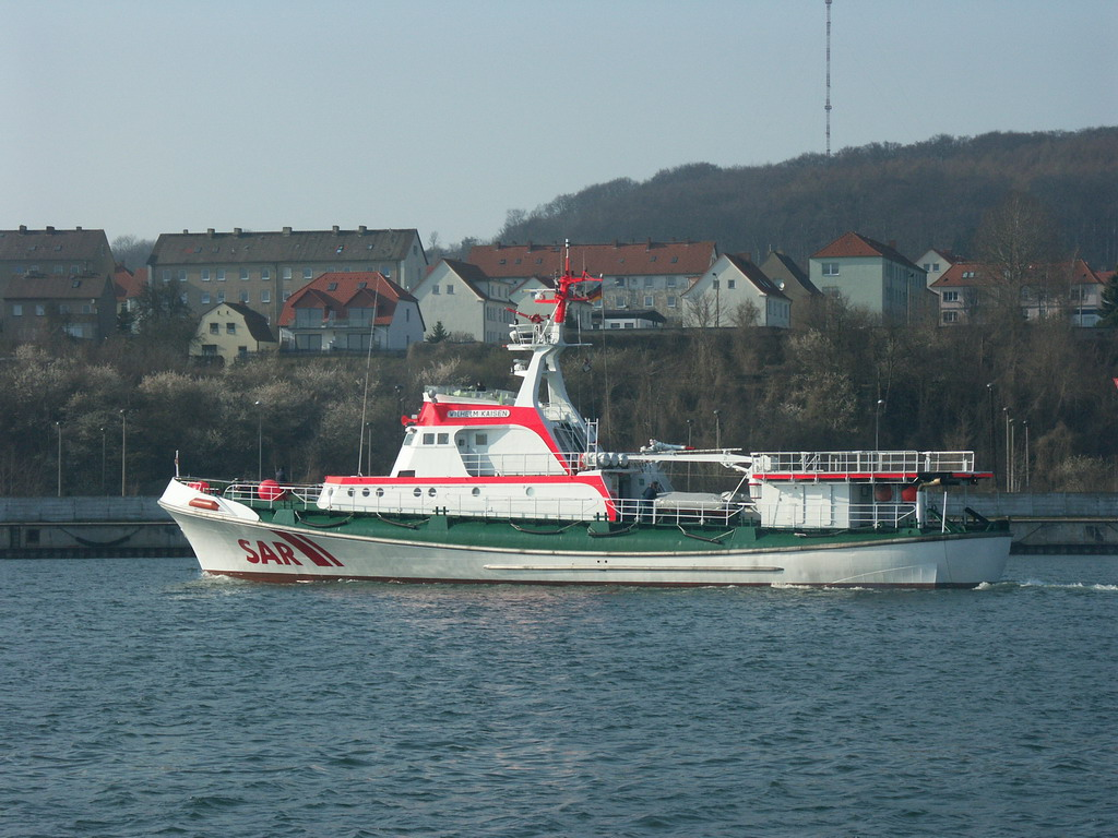 SK Wilhelm Kaisen im Hafen von Sassnitz